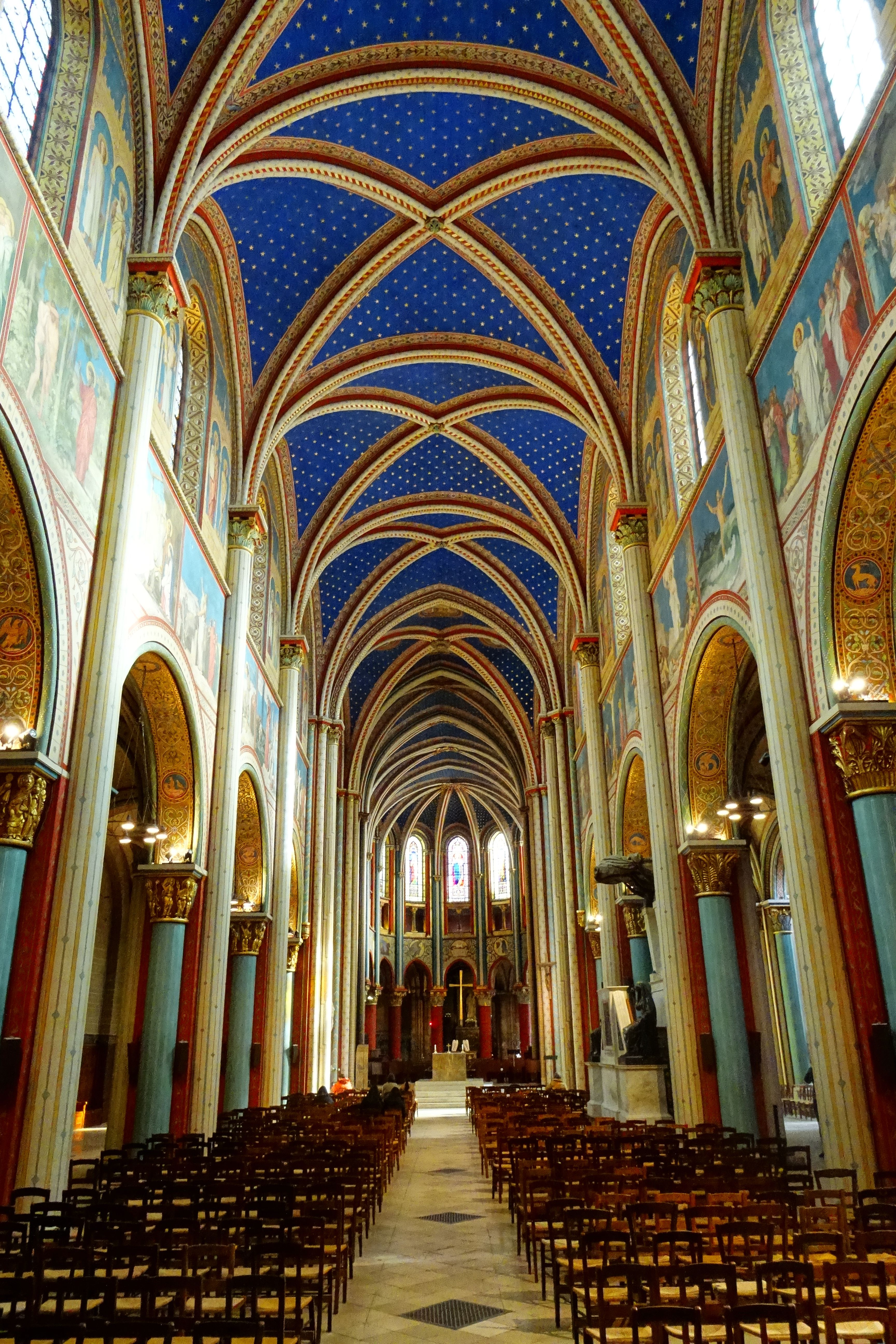 Nef, vue vers l'est.